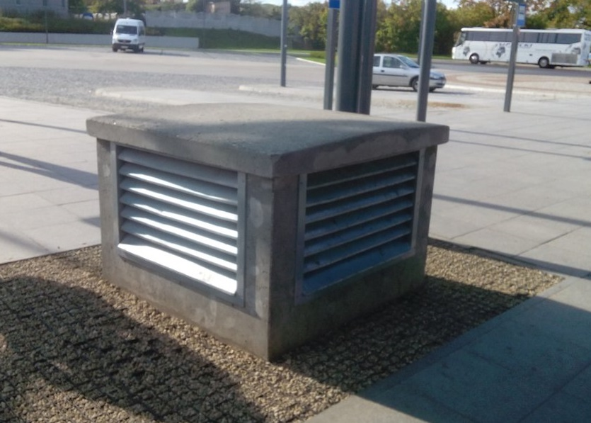 podczas przebudowy węzła komunikacyjnego przy dworcu w Tczewie w 2011 r. wyjście zapasowe z pobliskiego schronu zbudowano w nowej lokalizacji.